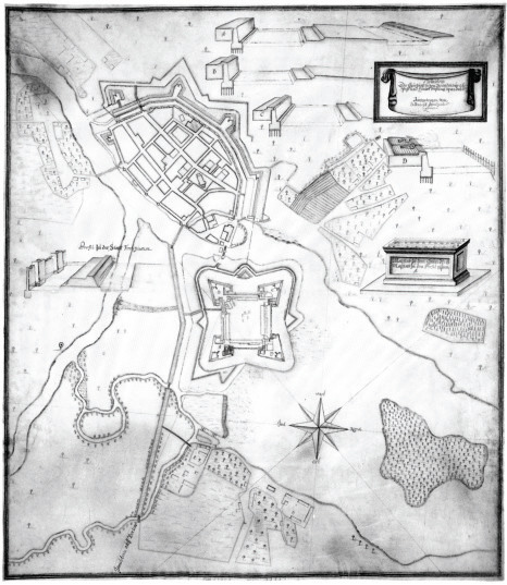 Grundtriss Der Churfürstlichen Brandenburg. Pass- und Haubt Vöstung Spandaw Format: 67,8 x 76,7 cm Kol. Handzeichnung auf Pergament